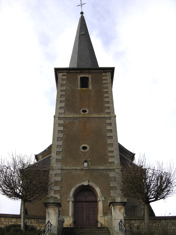 Kierch zu Zolwer